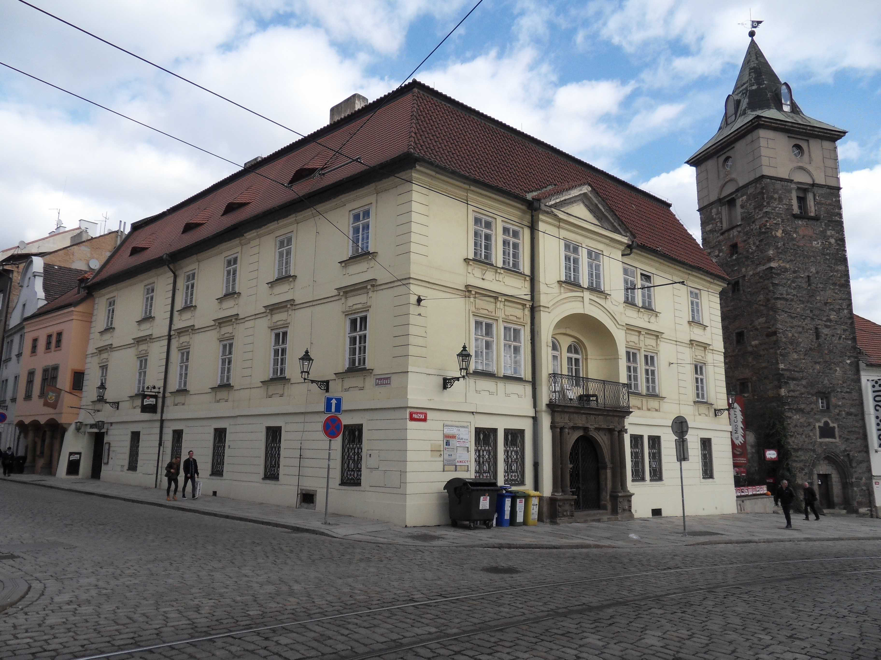 Dům U bílého lva, Pražská 84/15, Perlová 84/2, Plzeň.